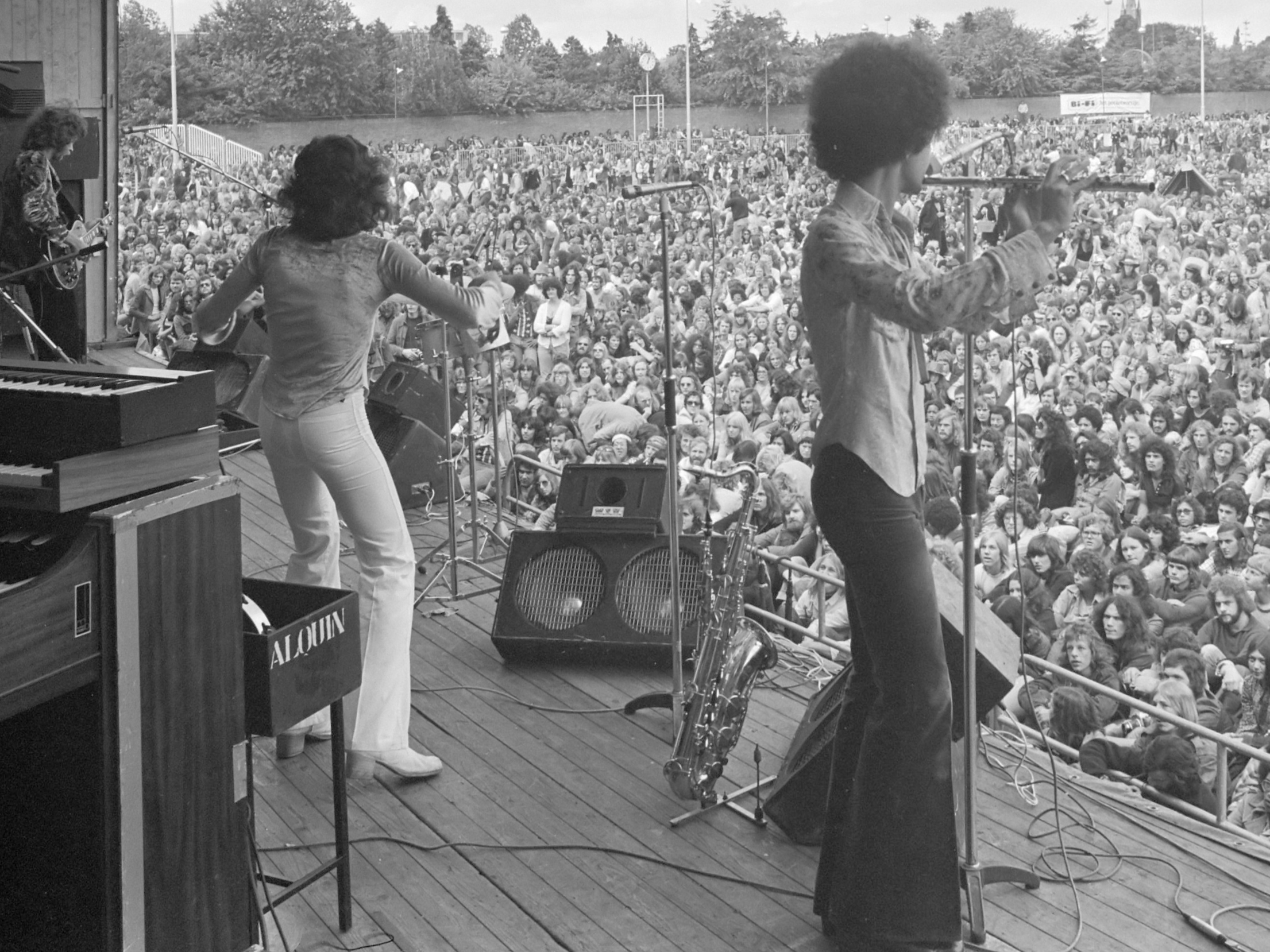 Internationaal Popfestival in Hilversum; overzicht vanaf podium 18 juli 1974